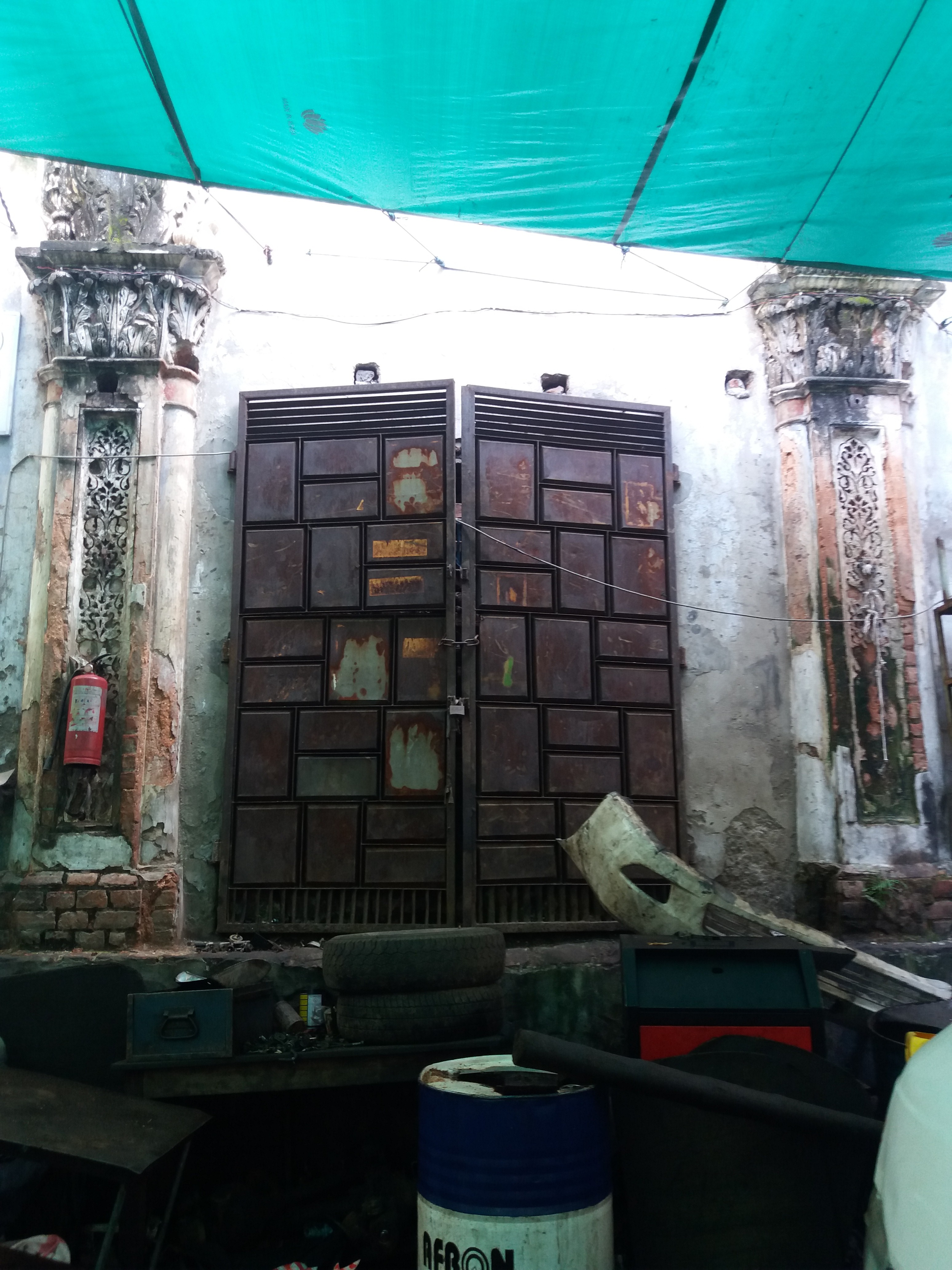 শঙ্খনিধি হাউজ এর মন্দির, বর্তমানে তালাবদ্ধ